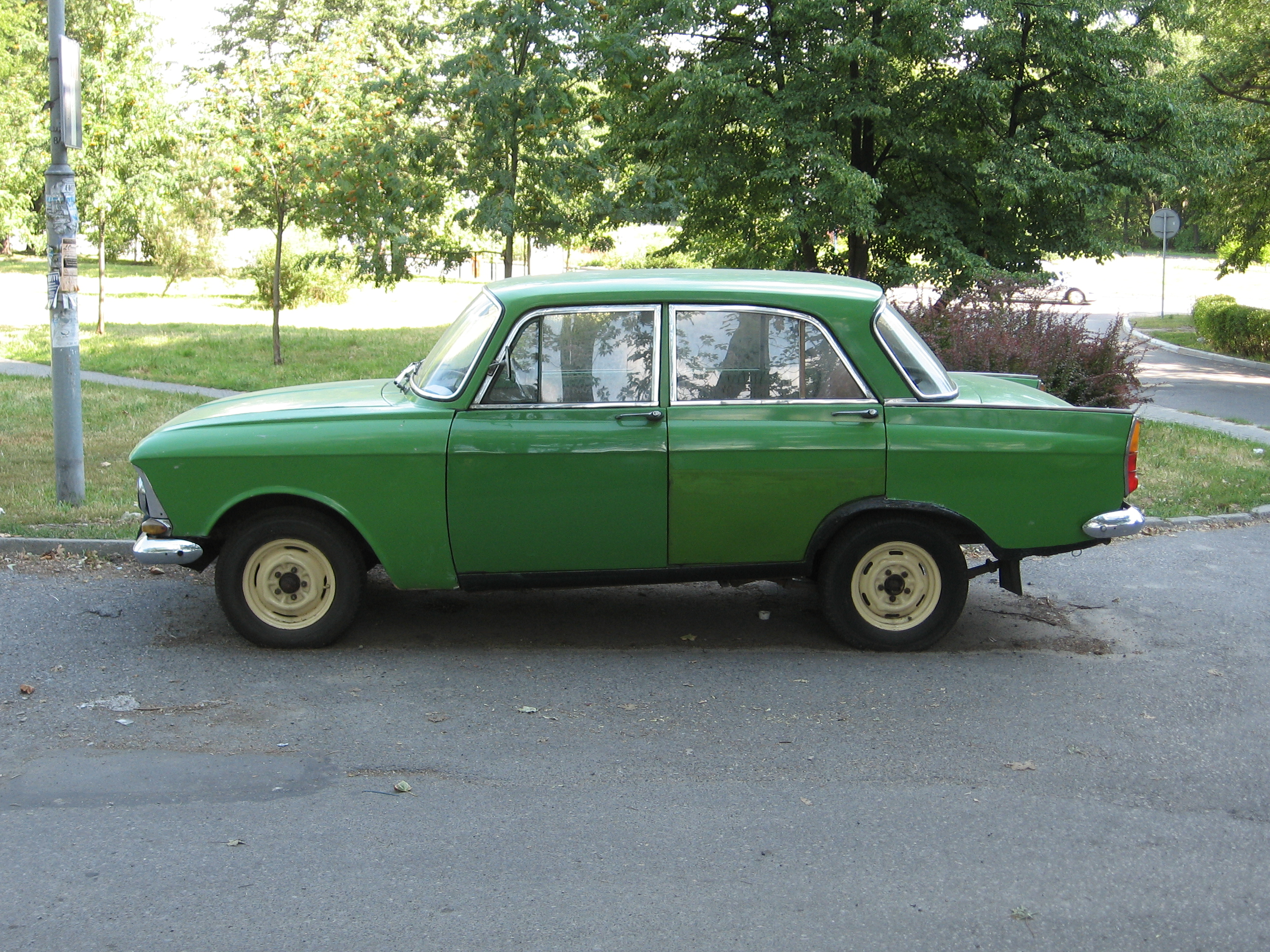 Moskvich